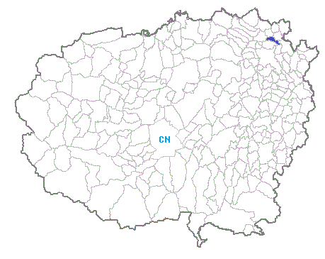 Posizione del comune nella provincia di Cuneo